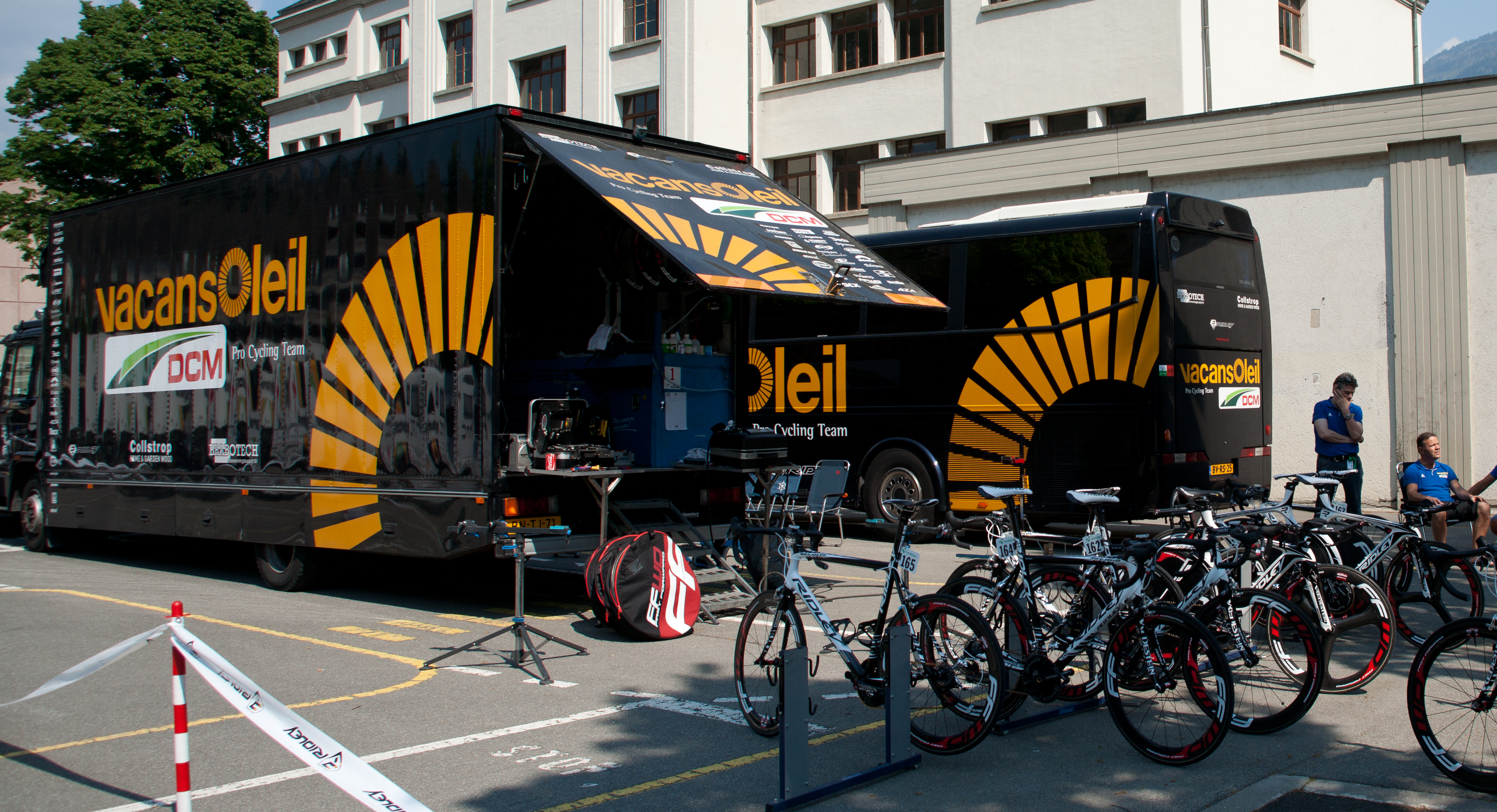 Contre la montre - Romandie 2010